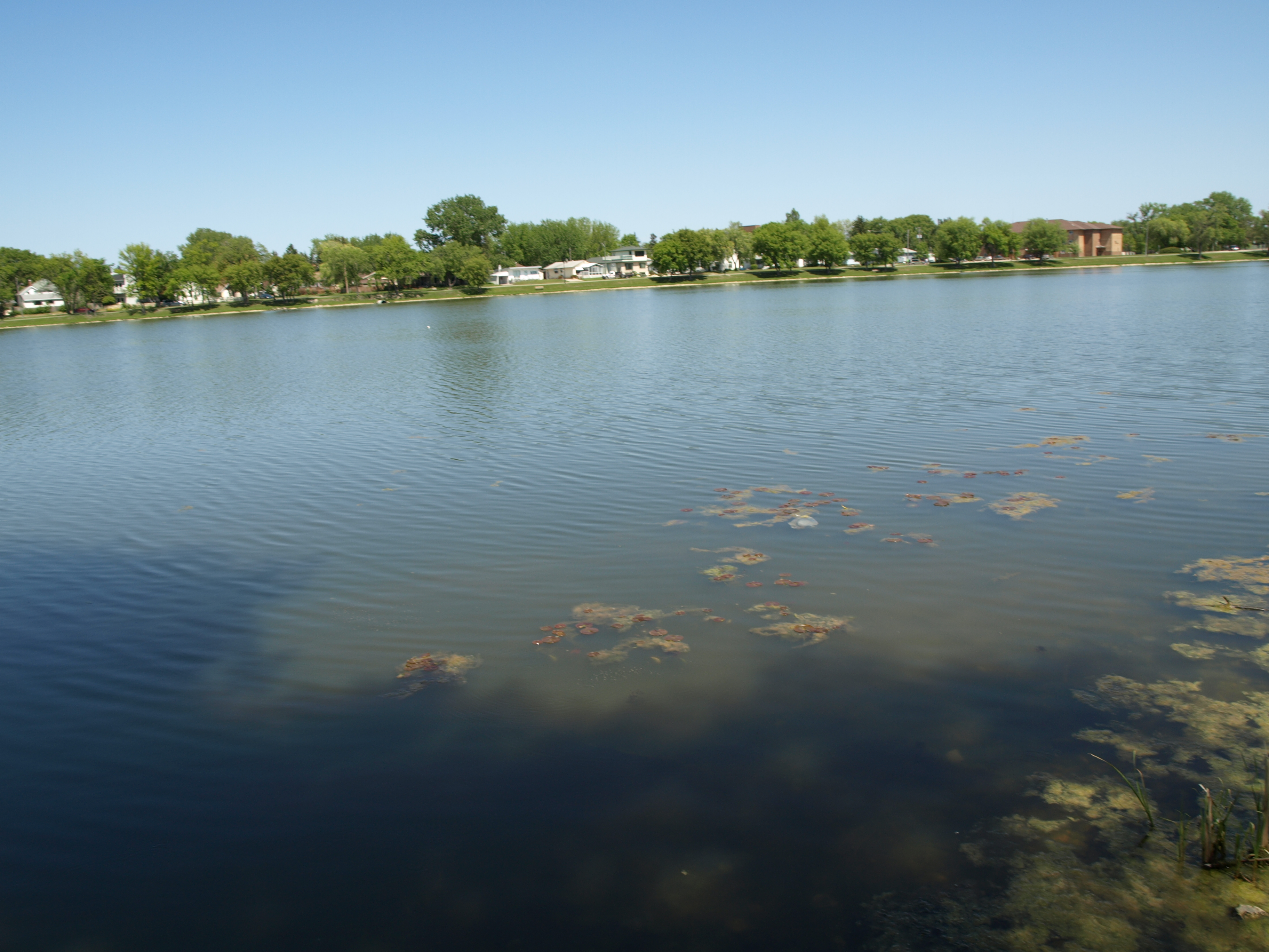 Portage La Prairie Manitoba Canada